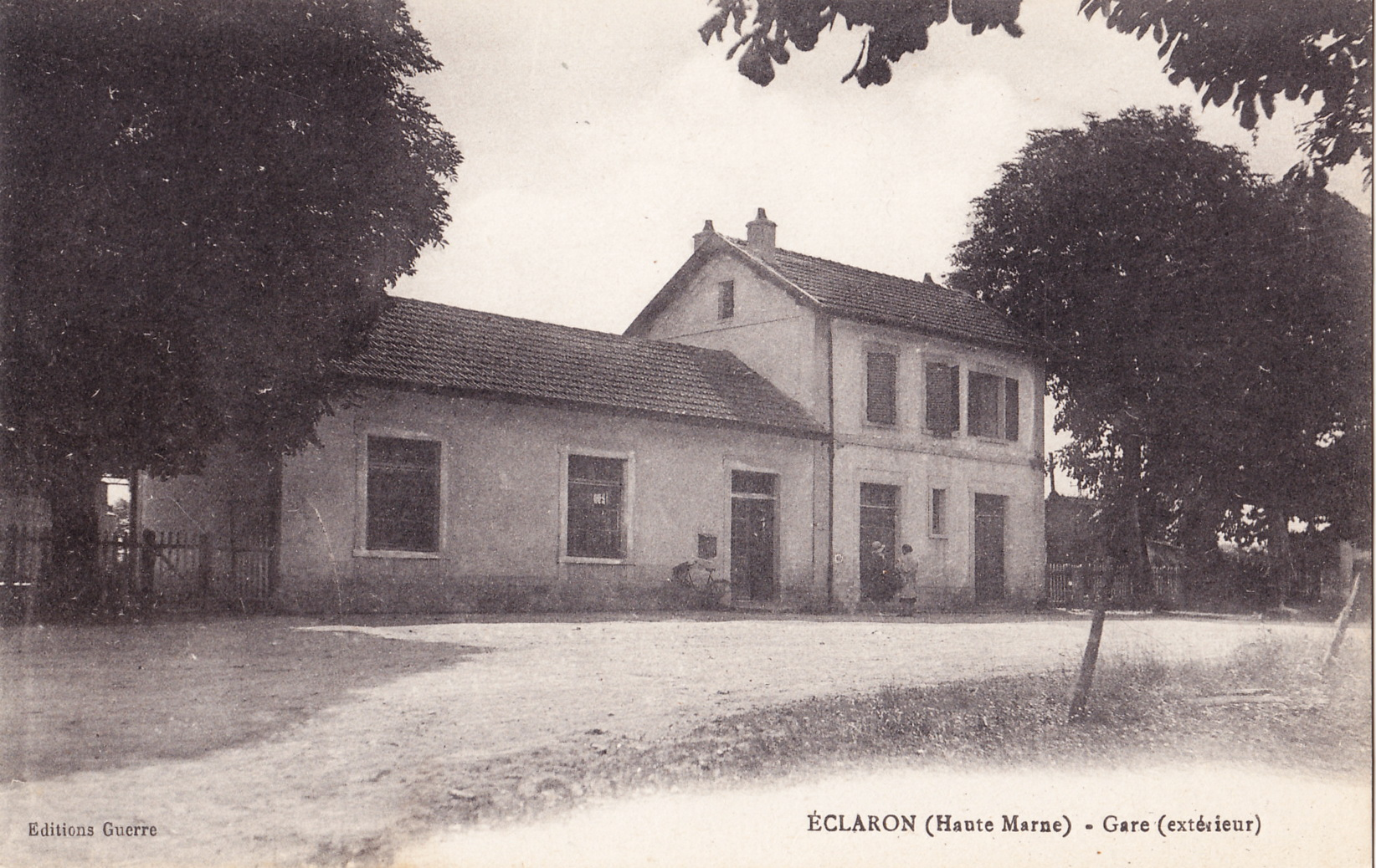 Carte postale ancienne éditée par Guerre : ECLARON - Gare (Extérieur)